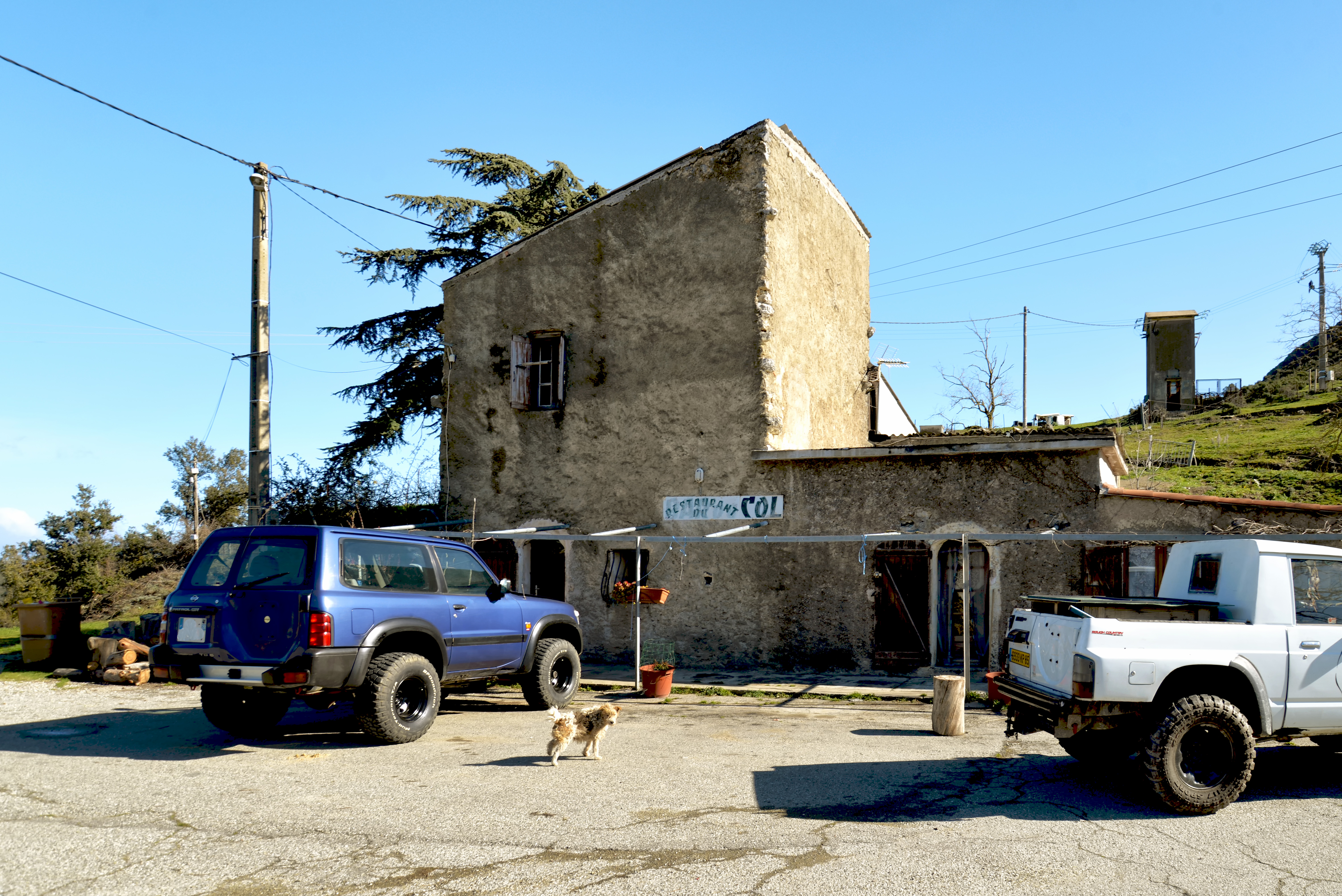 Tralonca, Talcini (Haute-Corse) - L'ancien « Restaurant du Col » au col de San Quilico, en bordure de l'ex RN 193. Il a dû fermer ses portes avec la déviation mise en place par le percement du tunnel routier de San Quilico.